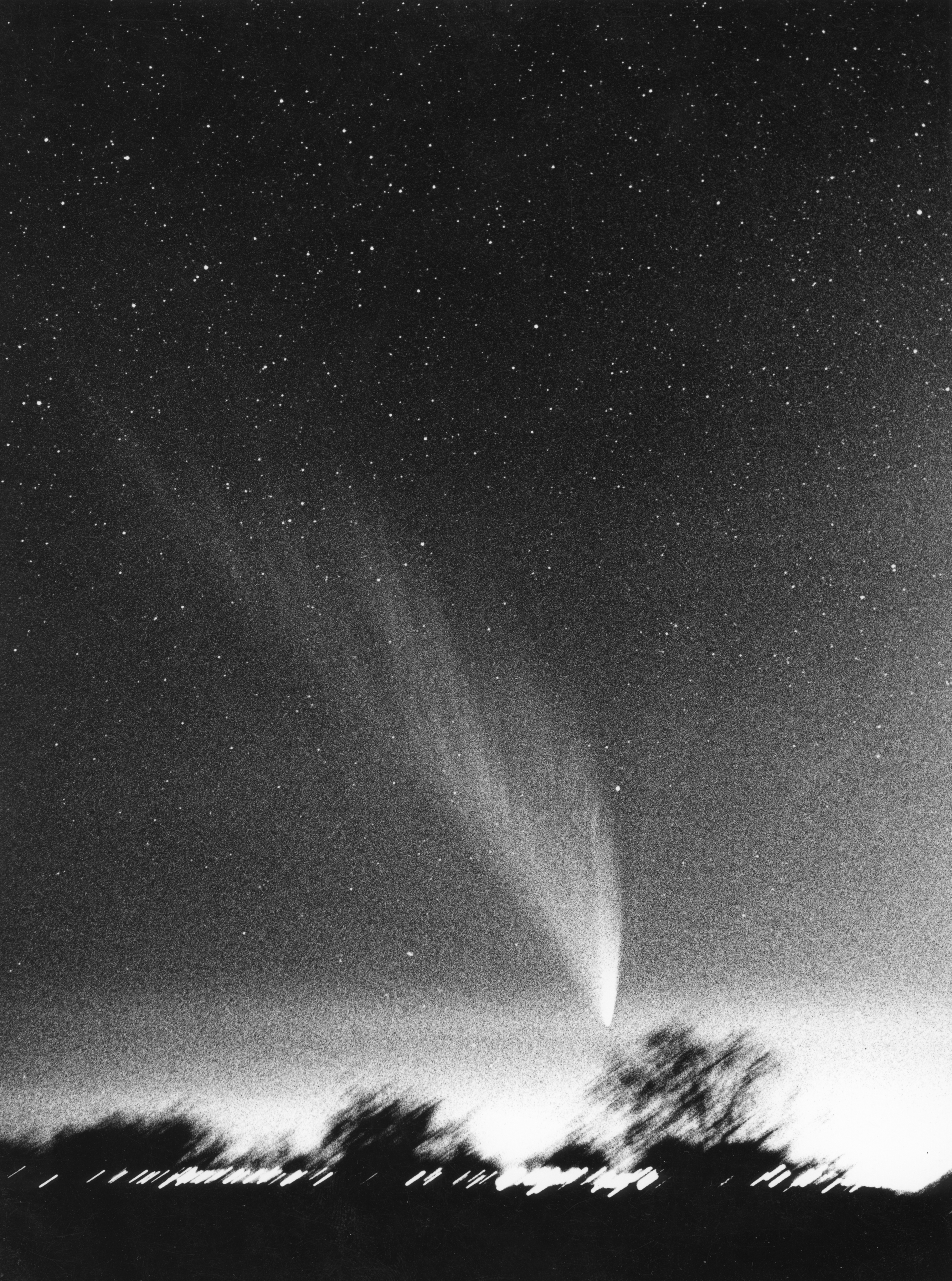 Komet West im Jahr 1976 fotografiert von Franz Haar an der vhs-Sternwarte Neumünster